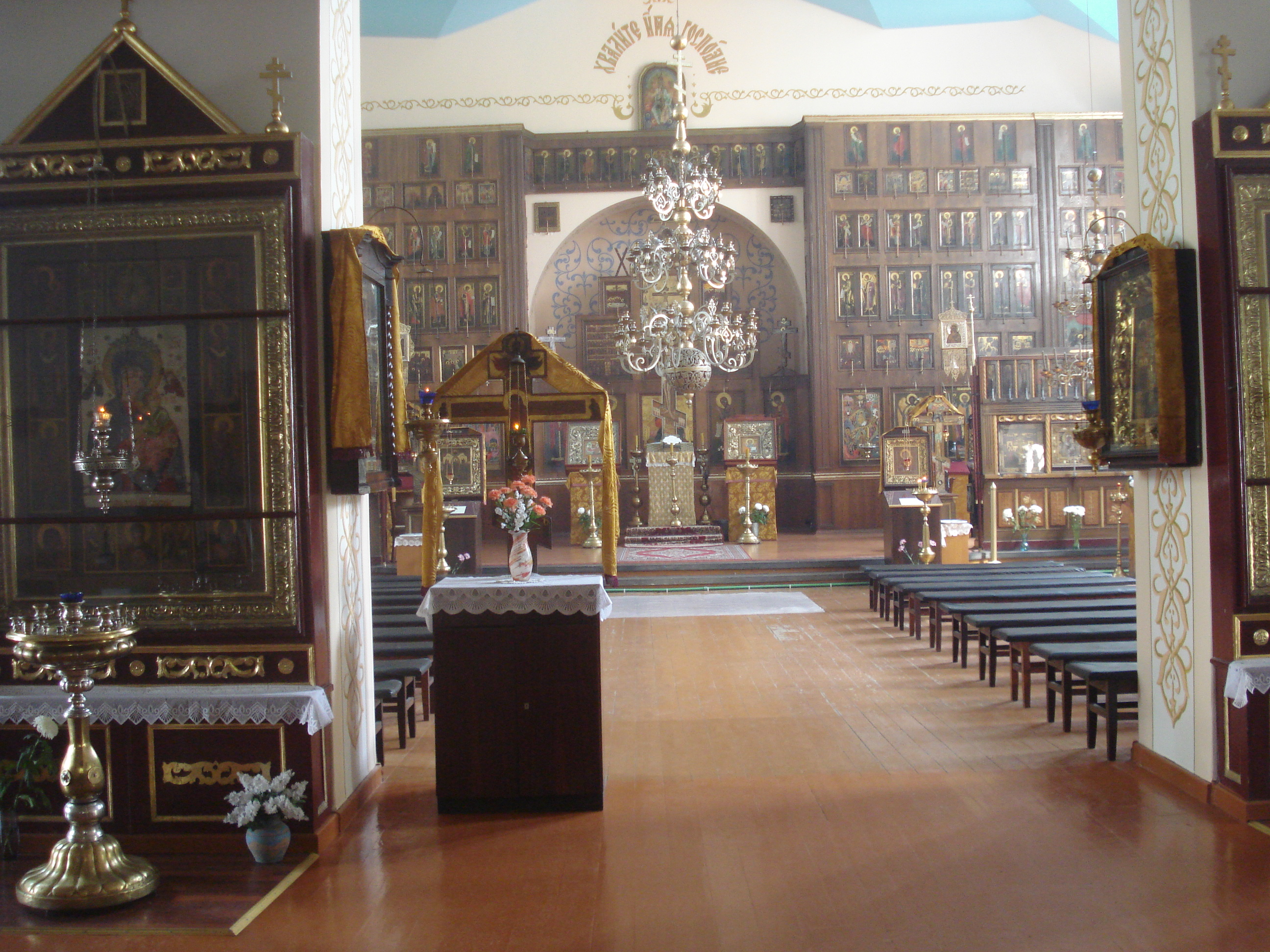 Daugavpils Old Believer Church of the Nativity of the Theotokos and St. Nikola. Interior. A. Pumpura iela 11a. Старообрядческий храм Рождества Пресвятой Богородицы и Святителя Николы. 1908-1928